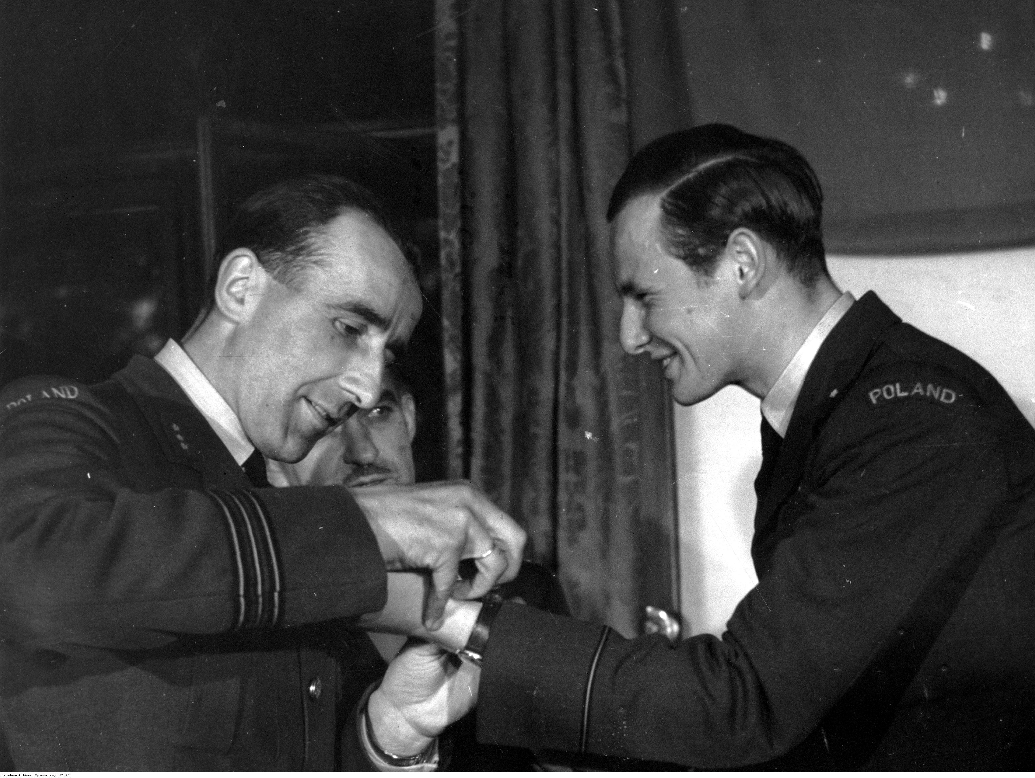 Uroczystość w dywizjonie myśliwskim 303, z okazji strącenia dwusetnego nieprzyjacielskiego samolotu. Ppor. Jerzy Śliwiński (z prawej) otrzymuje pamiątkowy zegarek.